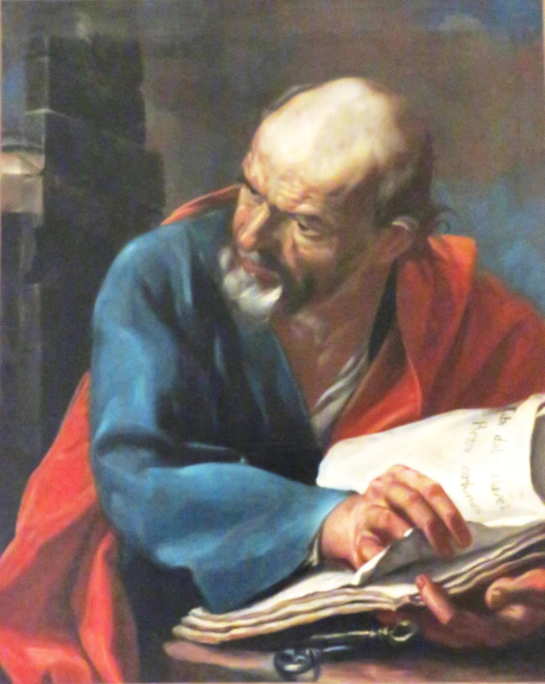 san pietro